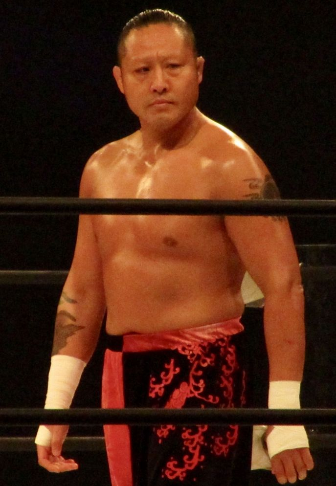 2017年11月3日